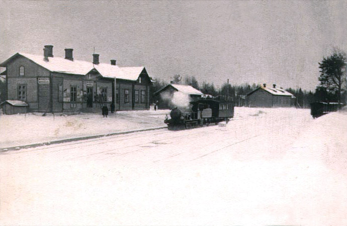 Поезд прибывает на станцию Маткаселькя.